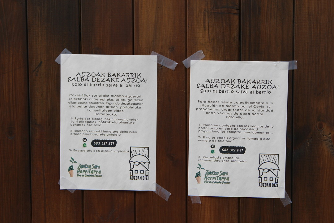 Gasteizko Aleak egindako argazki sorta, COVID-19aren eraginez hartutako neurriena. Argazki guztiak ikusgai helbidean.